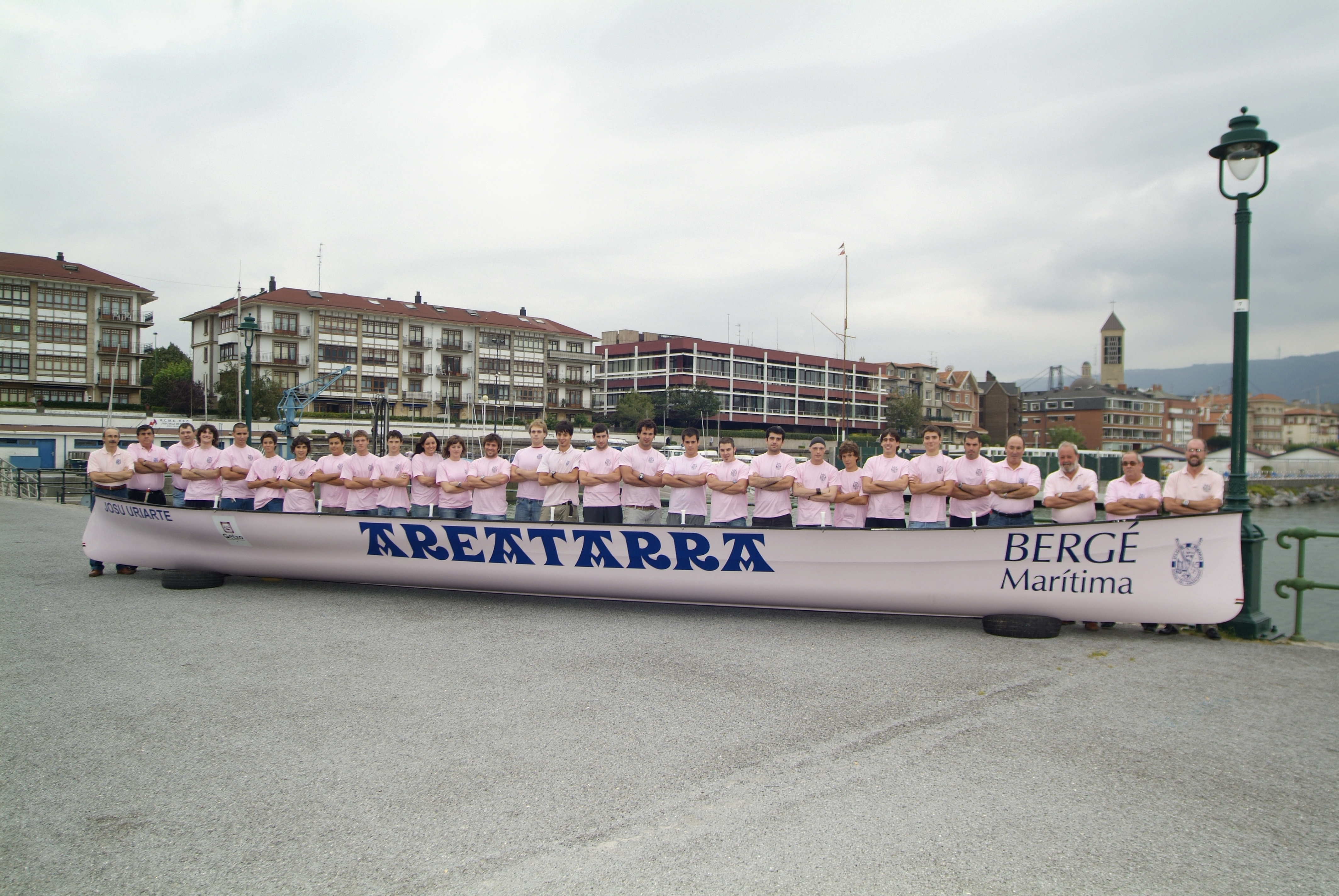 Trainière du club Raspas (Getxo - Biscaye) dans la Communauté autonome du Pays basque.